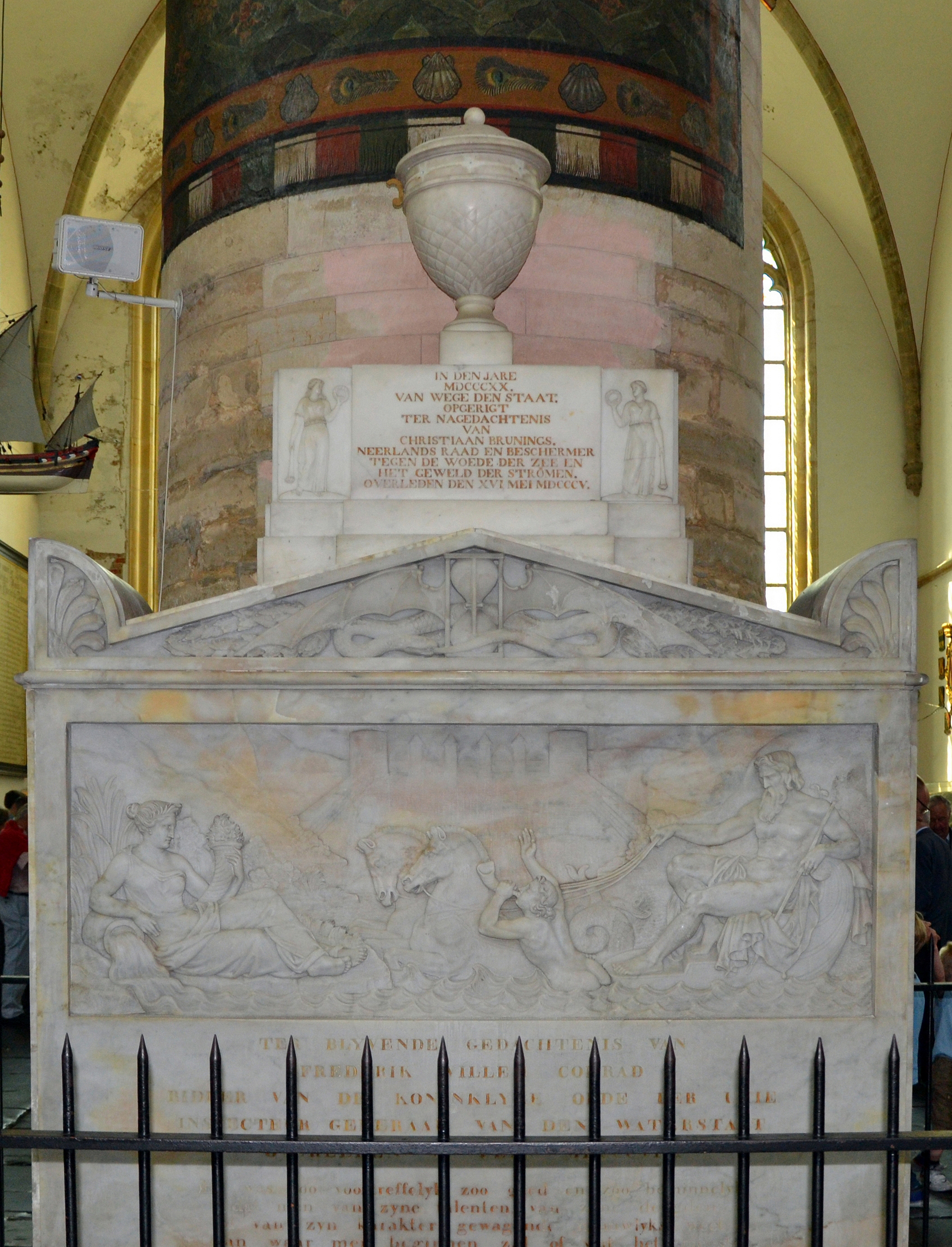 Grab von Christiaan Brunings (1736-1805) in der Grote Kerk in Haarlem